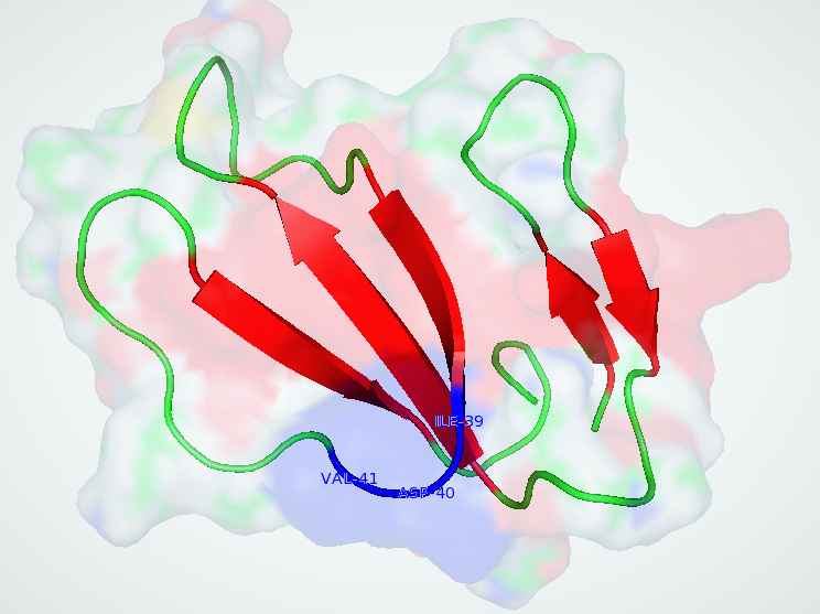 Estructura de la cardiotoxina II de la cobra Naja Naja Atra amb les cadenes beta marcades en vermell i en blau es marca la seqüència d'aminoàcids I-N-V.Estructura extreta del PDB i modificada mitjançant Pymol